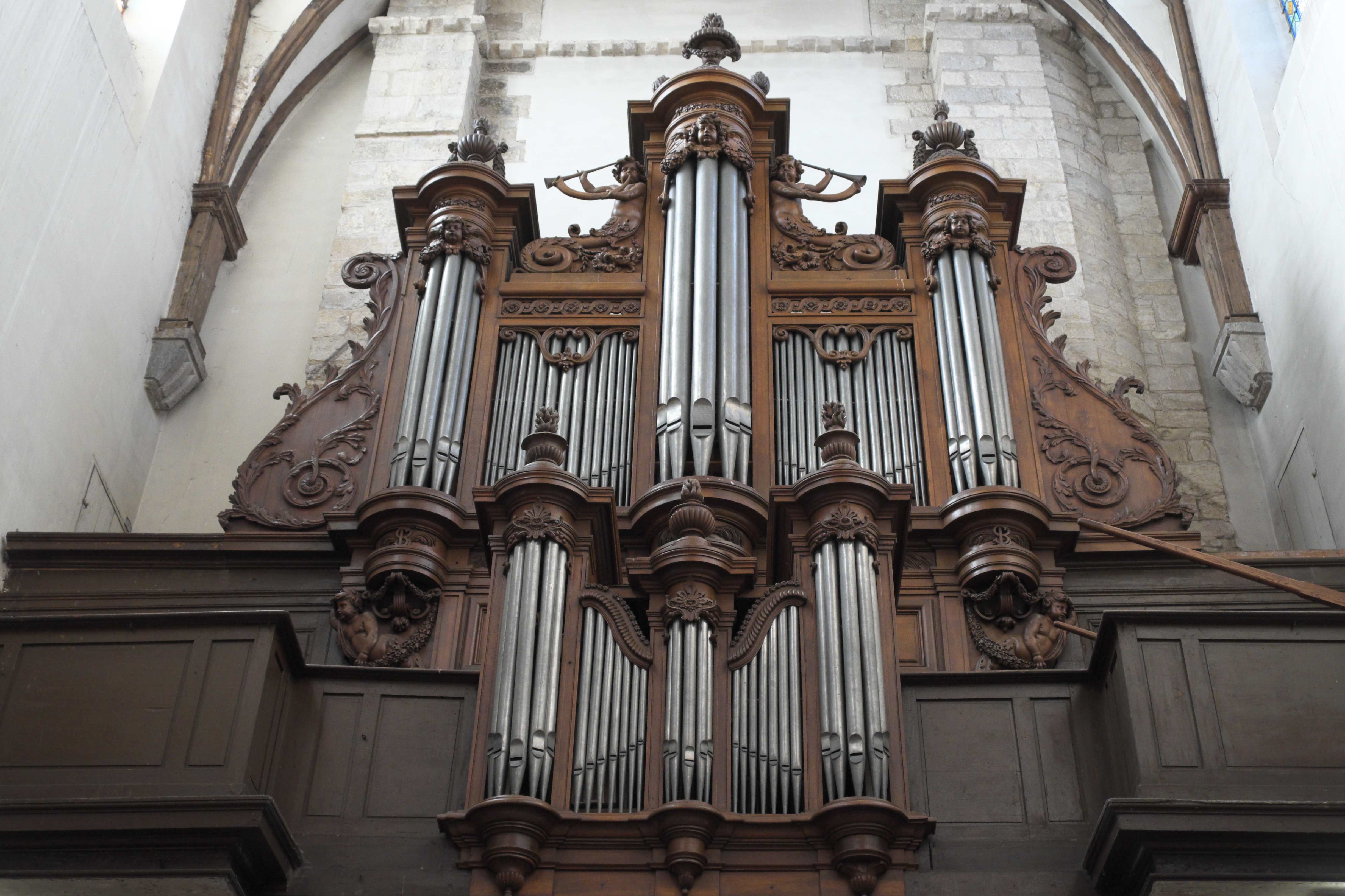 Katholische Pfarrkirche Saint-Jean-Baptiste in Nemours im Département Seine-et-Marne in der Region Île-de-France (Frankreich), Orgel von den Orgelbauern Pierre Lefebvre und Jacques Desenclos, von 1653